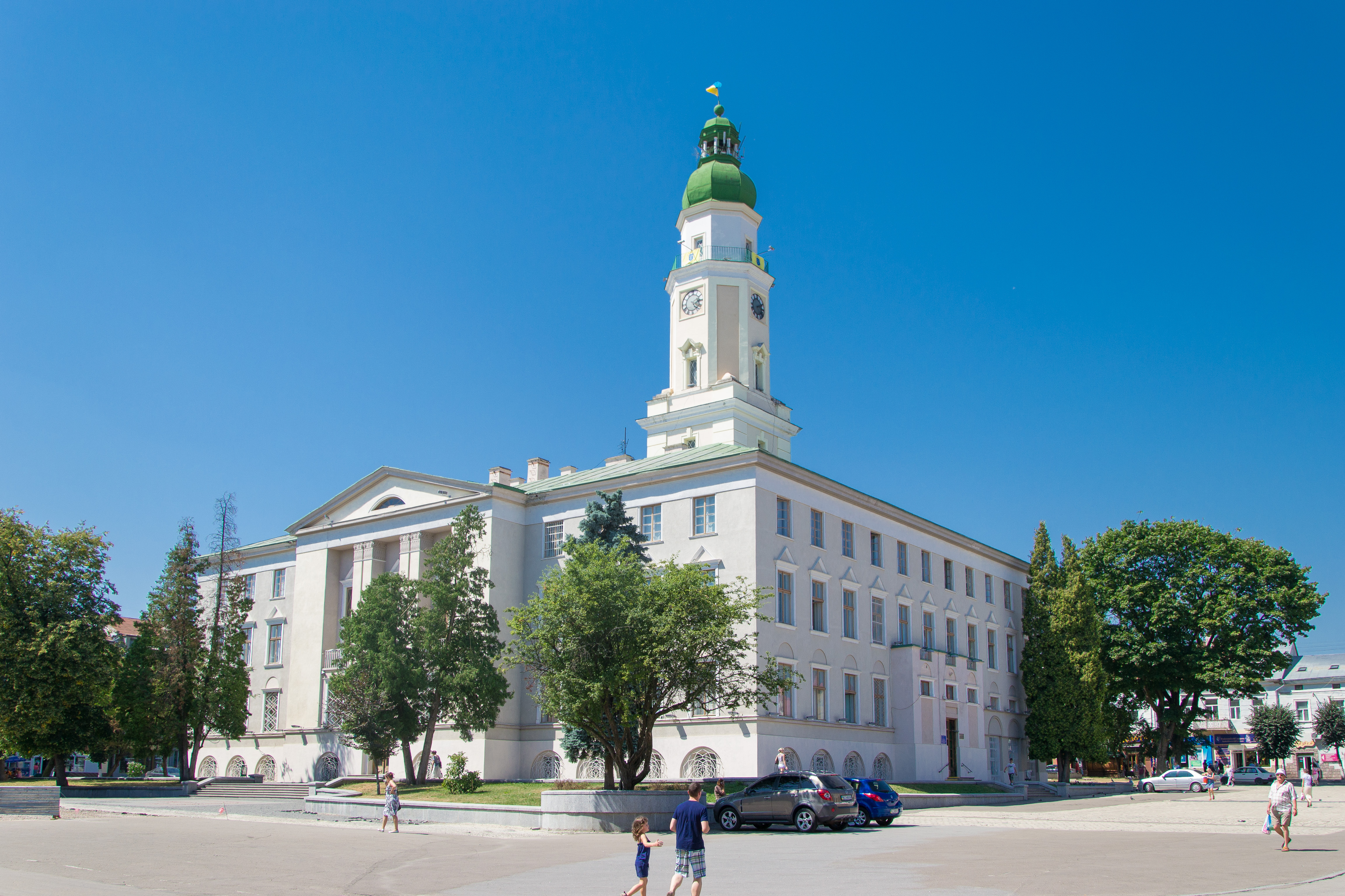 Ратуша (будинок магістрату), Дрогобич, пл. Ринок, 1